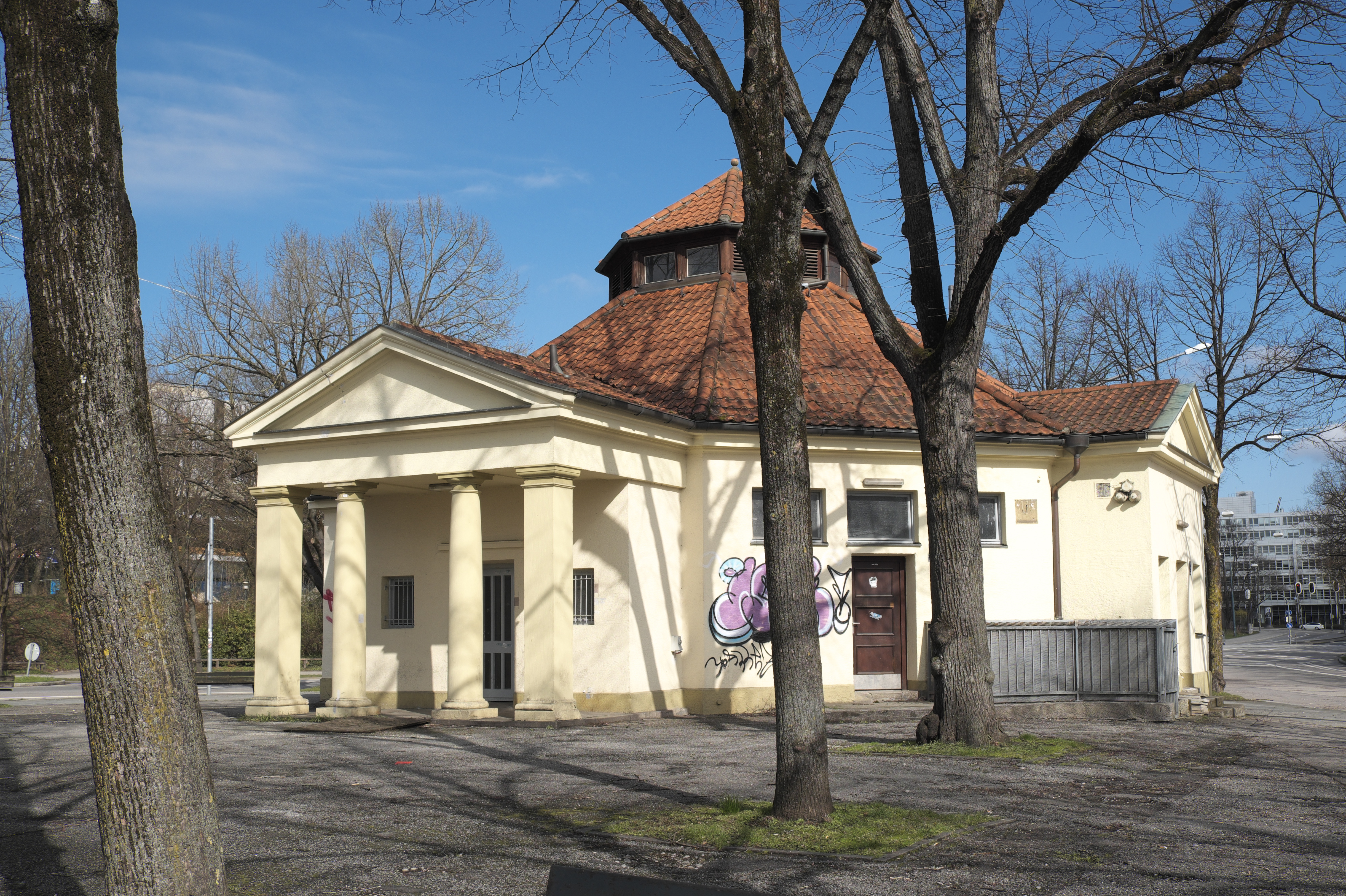 Öffentliche Bedürfnisanstalt am Bavariaring 5 in der Ludwigsvorstadt im Stadtbezirk Ludwigsvorstadt-Isarvorstadt in München (Bayern/Deutschland), 1894 von Hans Grässel erbaut